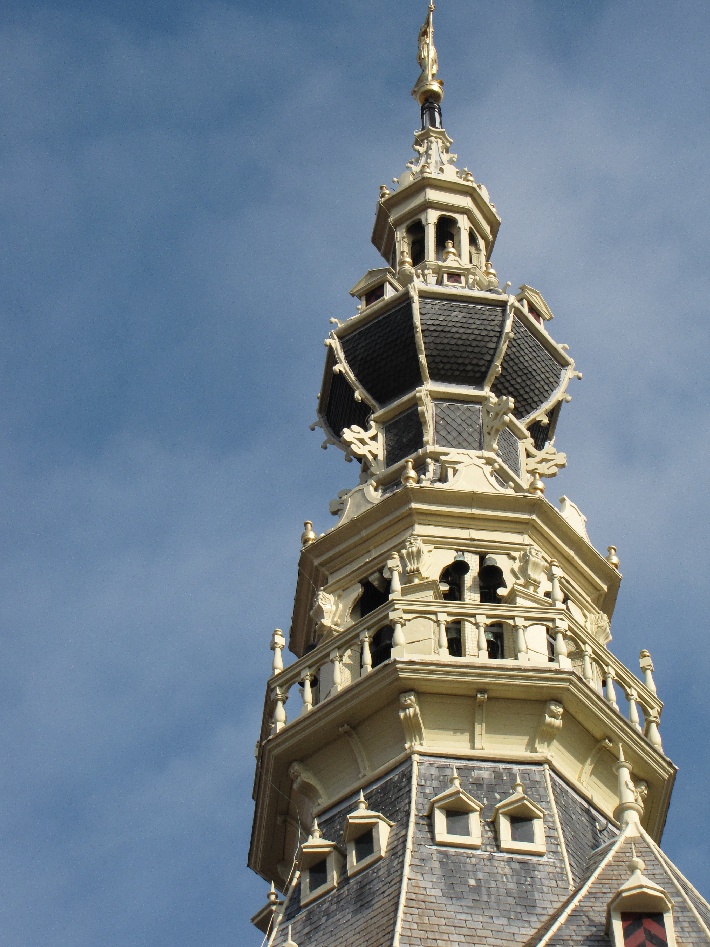 Raadhuis